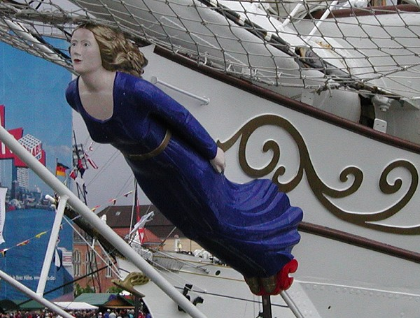 Galleonsfigur des Segelschiffes Christian Radich